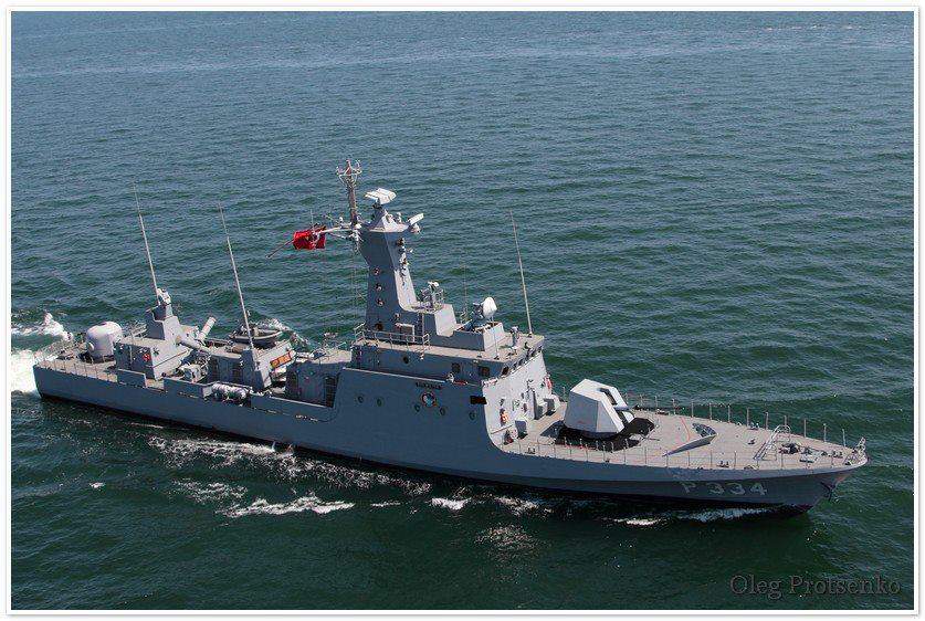 "Сі Бриз 2013". Тренування в морі кораблів учасників навчань У тренуванні брали участь: фрегат “Гетьман Сагайдачний”, великий десантний корабль “Костянтин Ольшанський”, морський тральщик “Чернігів”, фрегат ВМС Румунії “Марушесті”, катер ВМС Грузії “Сухумі”, ракетний катер ВМС Туреччини “Мелтем” та катер державної прикордонної служби України. Фото: Олег Проценко